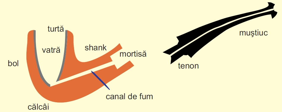 Componența pipă